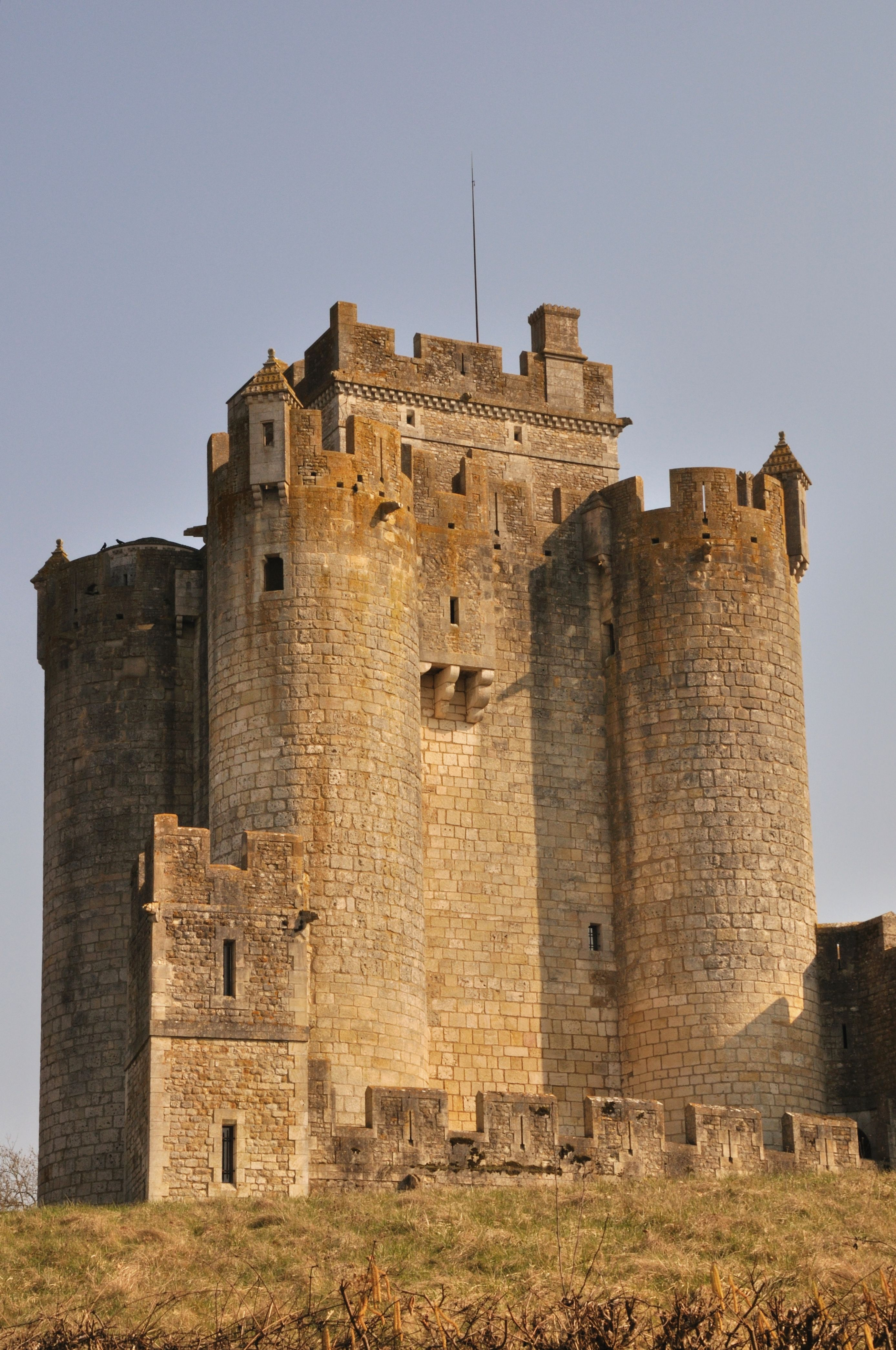 This building is en partie classé, en partie inscrit au titre des Monuments Historiques. .